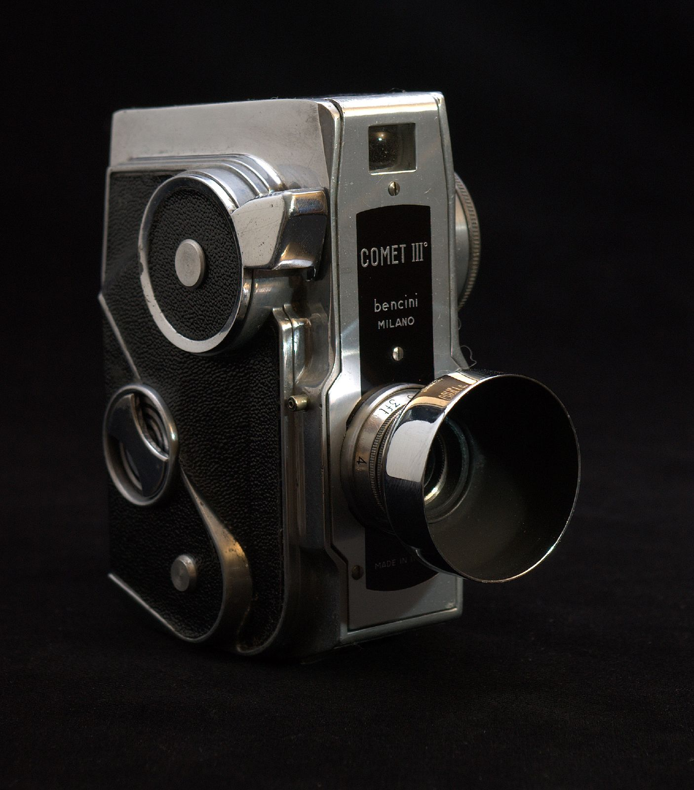 Italian designed 127 rollfilm Bencini camera.